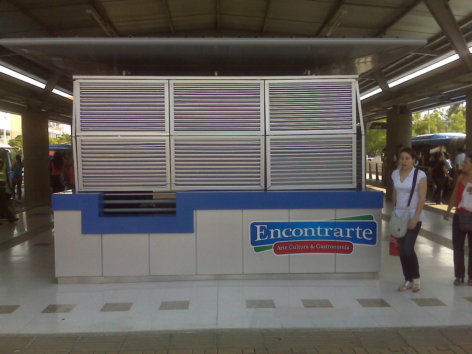 Puesto de Comidad "Encontrarte" del MIO